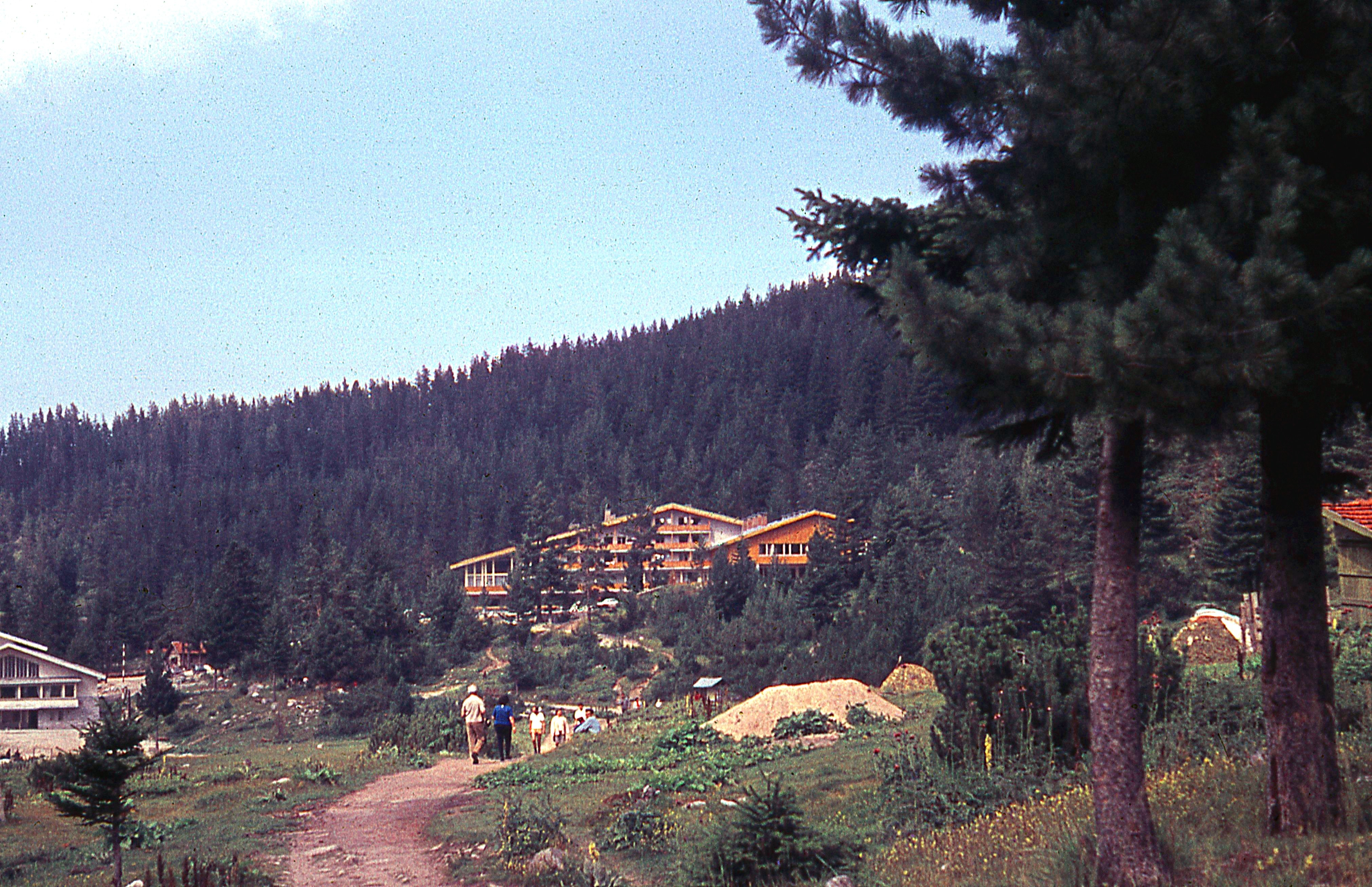 Bulgarien, Berg Maljowiza